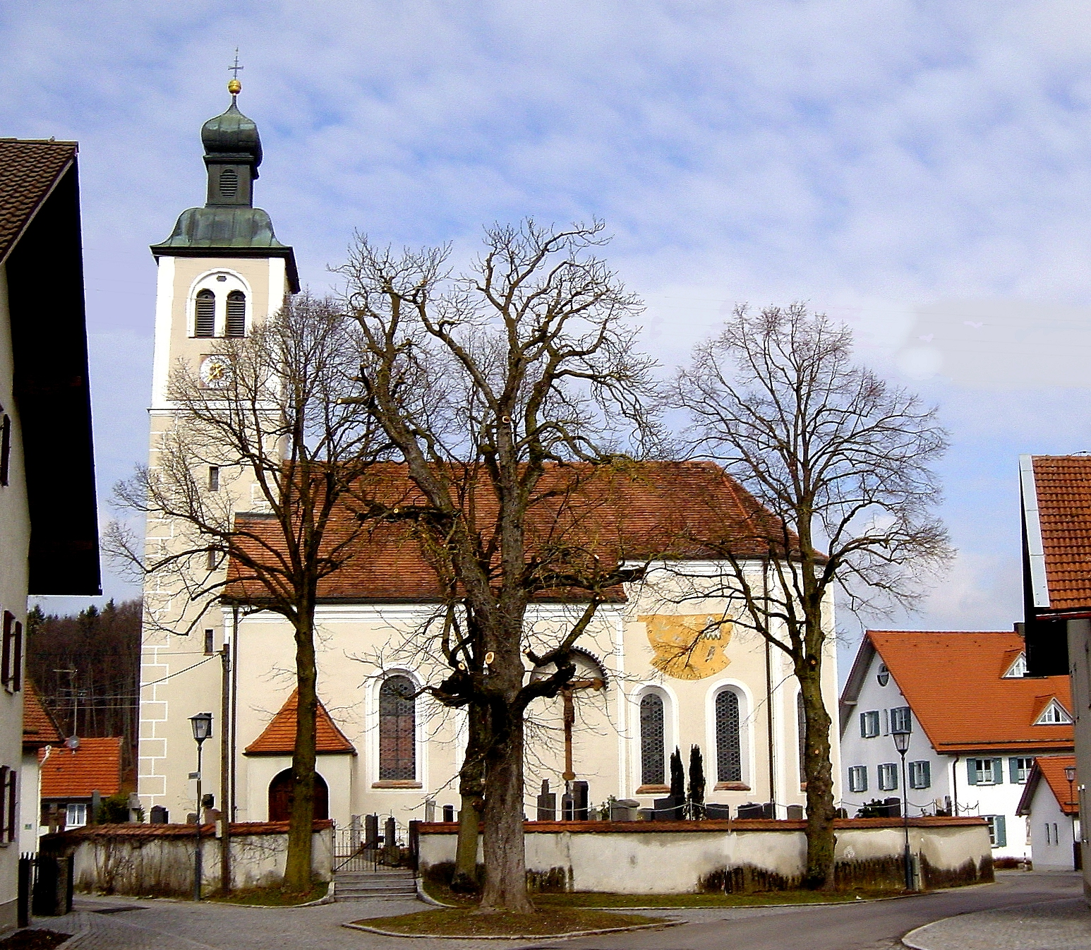 Starnberg, OT Perchting, Südseite der Kirche Mariä Heimsuchung. Rechts im Bild der ehemalige Pfarrhof.